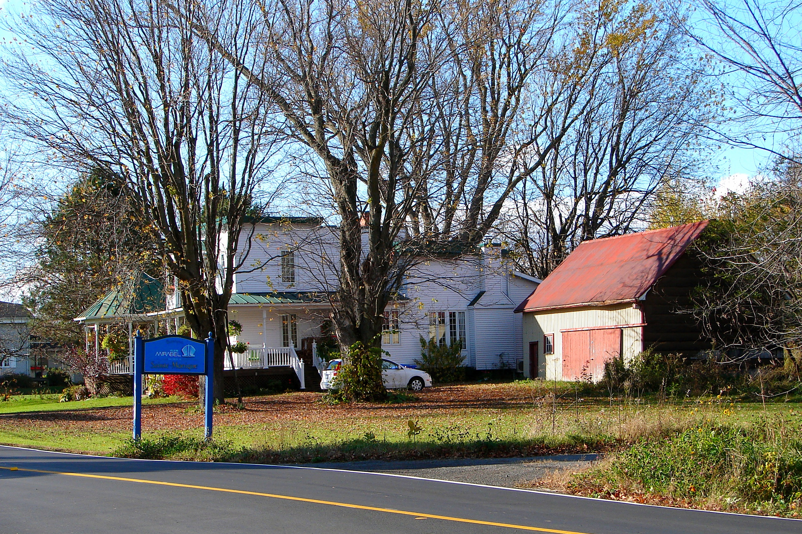 Sainte-Monique (Mirabel), Quebec, Canada